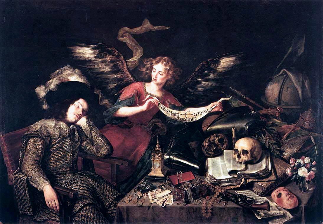 La obra representa a un caballero del siglo XVII vestido con la indumentaria de la época y dormido mientras un ángel le muestra el carácter efímero de los placeres, las riquezas, los honores y la gloria. El ángel le muestra el jeroglífico de la fecha sobre el sol, que hiere, vuela raudo y mata. El conjunto de objetos situados sobre la mesa constituye un auténtico bodegón en el que se establece una condensación de símbolos y alegorías. Los símbolos de la mesa son muy complejos, pero destacan algunos por su presencia continua en todas las "vanitas": la calavera que simboliza la muerte, la máscara de teatro sobre la hipocresía, las joyas y el dinero que son las riquezas que no podemos llevar al otro mundo, la baraja y las armas como el juego y los placeres de la caza, el reloj que indica el paso inexorable del tiempo, la vela apagada que indica la extinción de la vida... son innumerables los objetos y los múltiples significados engarzados que podemos entresacar de todos ellos. El pintor ha representado un "corpus" de los objetos de la vanidad del mundo y de su sin sentido tratados con una definición magistral que los individualiza como forma de acentuar, a través de lo real, la presencia de su carácter didáctico, alegórico y moral.